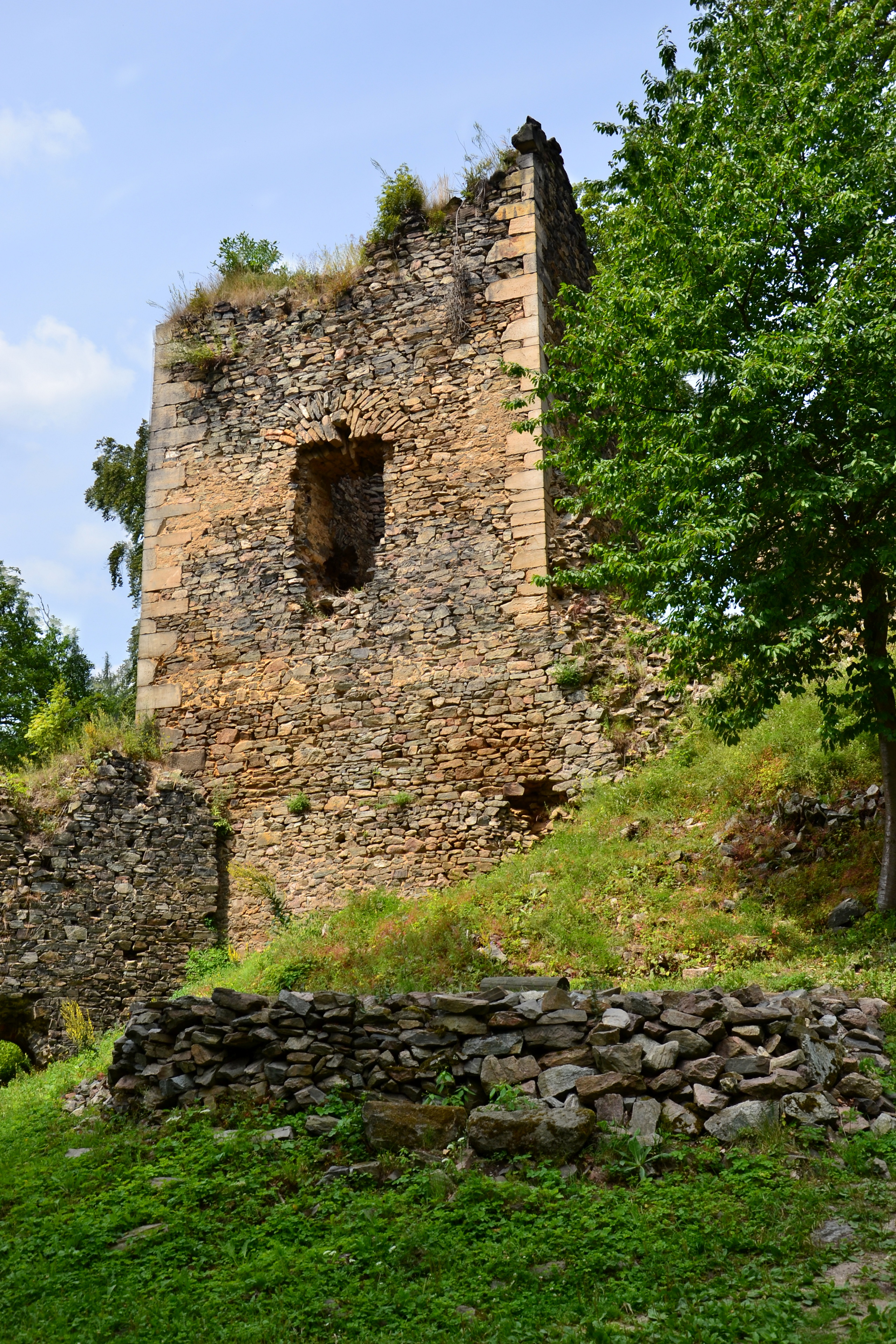 Zřícenina hradu Rýzmburk - donjon, Osek (okres Teplice).